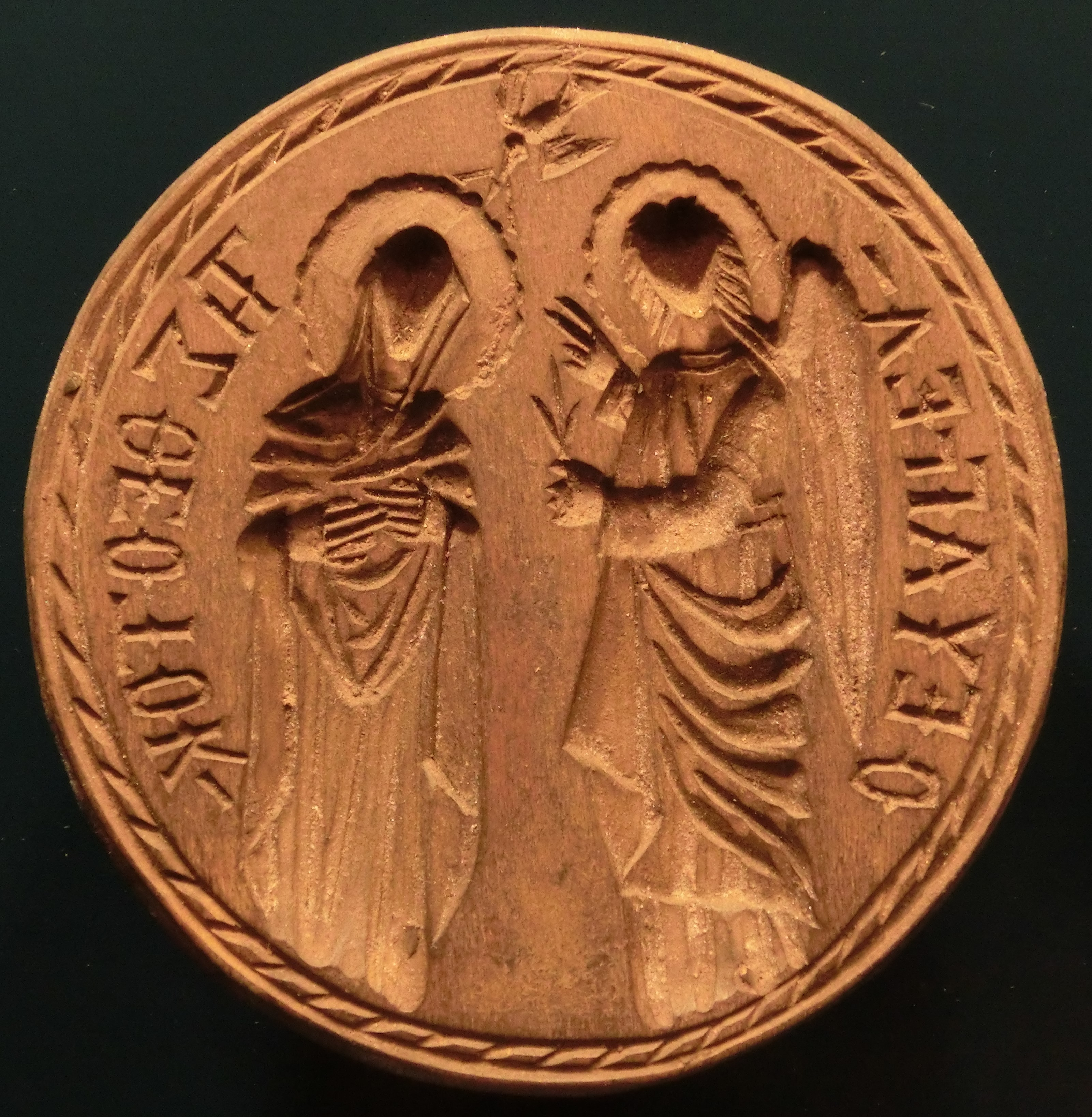 Griechenland - Kreta: Brotstempel mit der Verkündung an Maria (Holz; Kreta, um 1850) im Museum der Brotkultur, Ulm